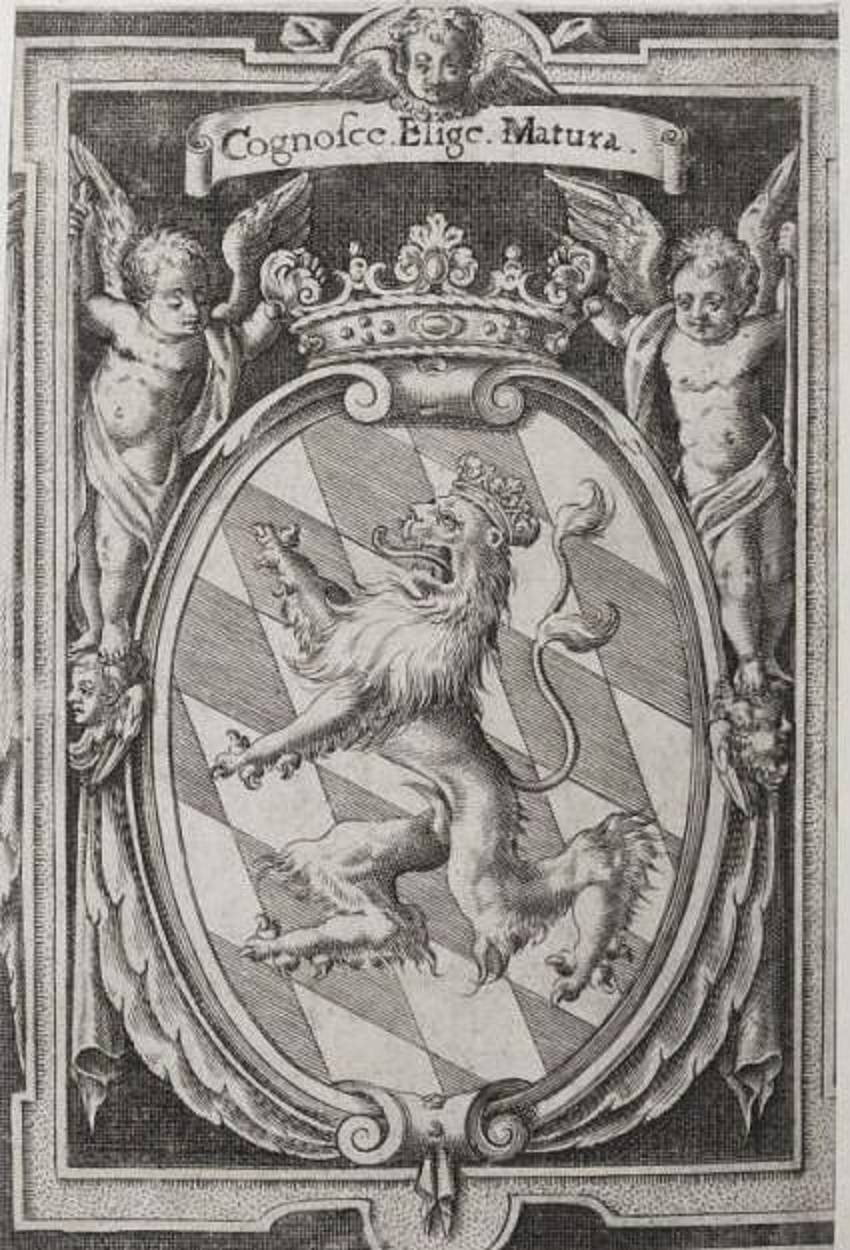 Wappen der Grafen von Wartenberg des Stammes Haus Wittelsbach-Bayern (= Bastardwappen: pfälzischer Löwe (Pfalzgraf) über silber-blauen Wittelsbacher Rauten (Bayern)); Wappengrafik gefertigt für Graf Franz Wilhelm von Wartenberg (Franciscvs Gvillelmvs Comes a VVartenberg = Franz Wilhelm Kardinal Reichsgraf von Wartenberg (* 1. März 1593 in München; † 1. Dezember 1661) war ein Kardinal aus einer Seitenlinie des Fürstenhauses Wittelsbach. Er zählt zu den bedeutendsten Fürstbischöfen von Osnabrück und Regensburg; zudem leitete er die Diözesen Minden und Verden.)